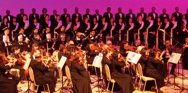 Хоровая капелла Азербайджана